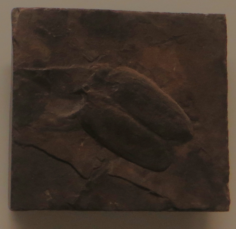 Fossil of Solemya- Took the picture at Museum am Lowentor, Stuttgart